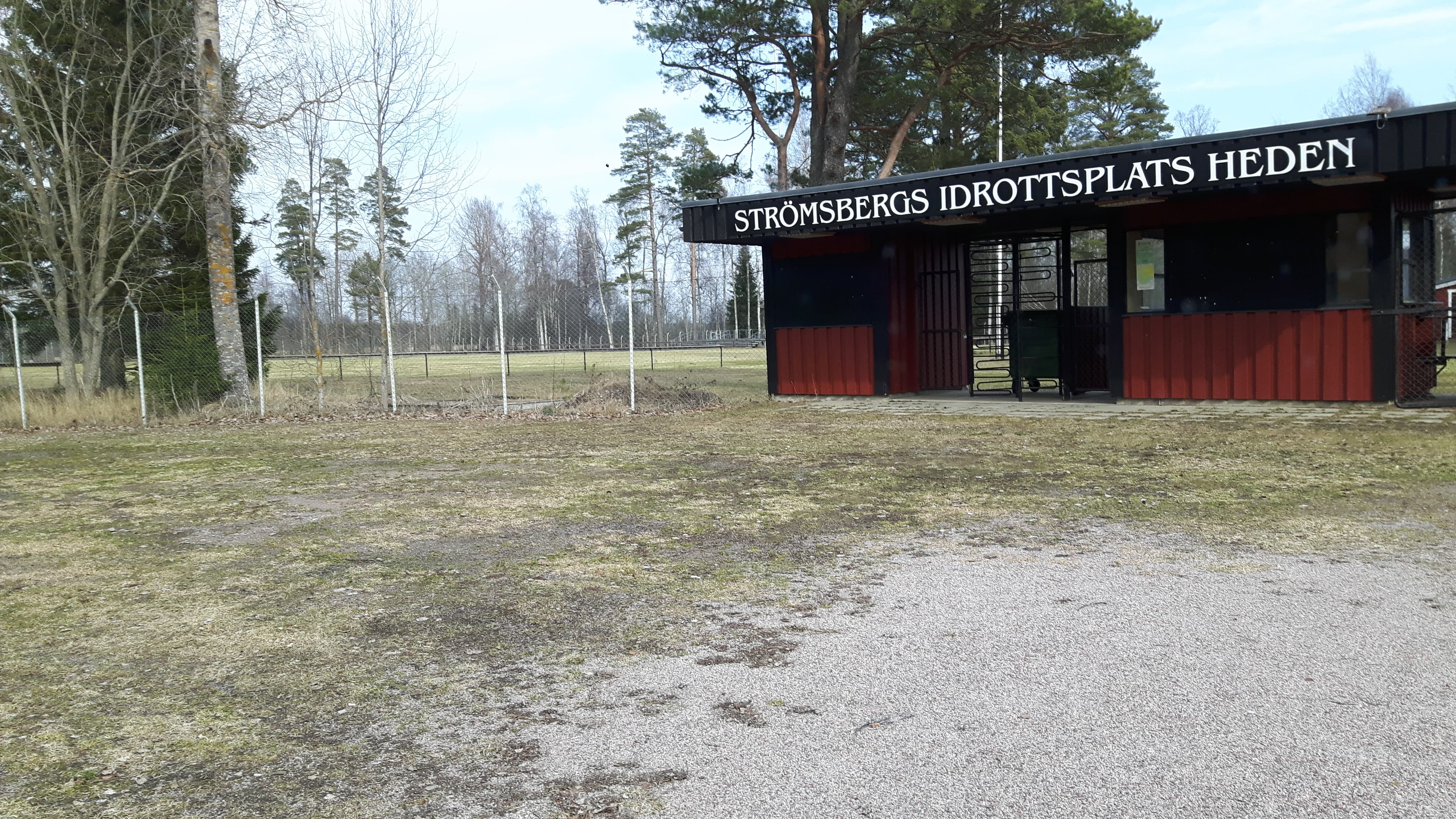 Strömsbergs IFs hemmaarena som invigdes officiellt 17 augusti 1913. Föreningen bildades 3 augusti 1912.